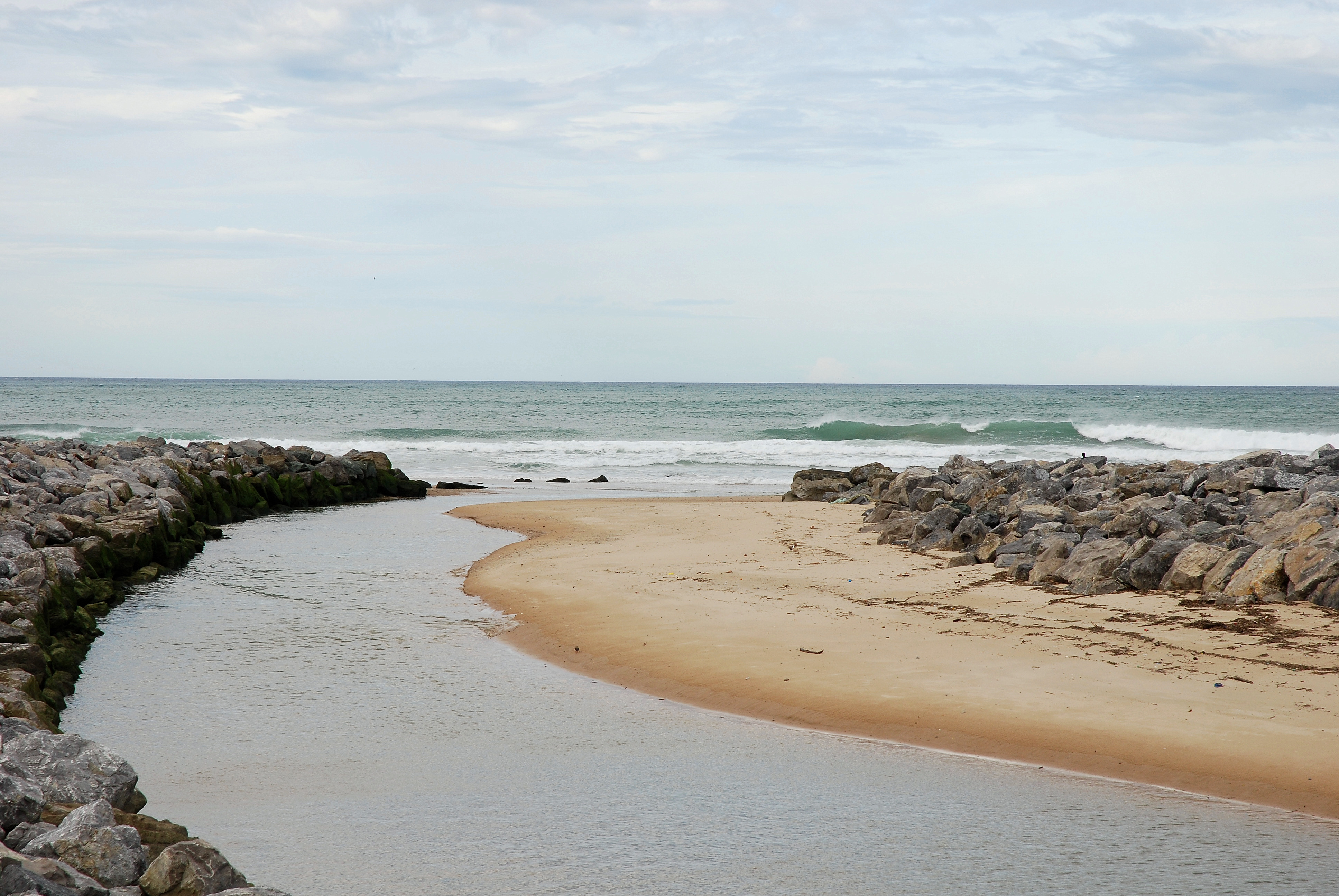 Bidart, l'Uhabia se jette dans l'océan. Photo prise le 20/10/06 par Harrieta171